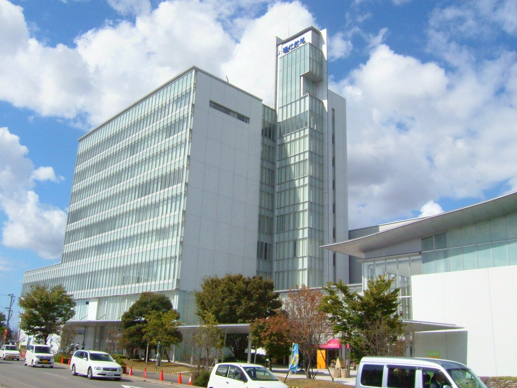 福井新聞社本社（福井県福井市大和田町）